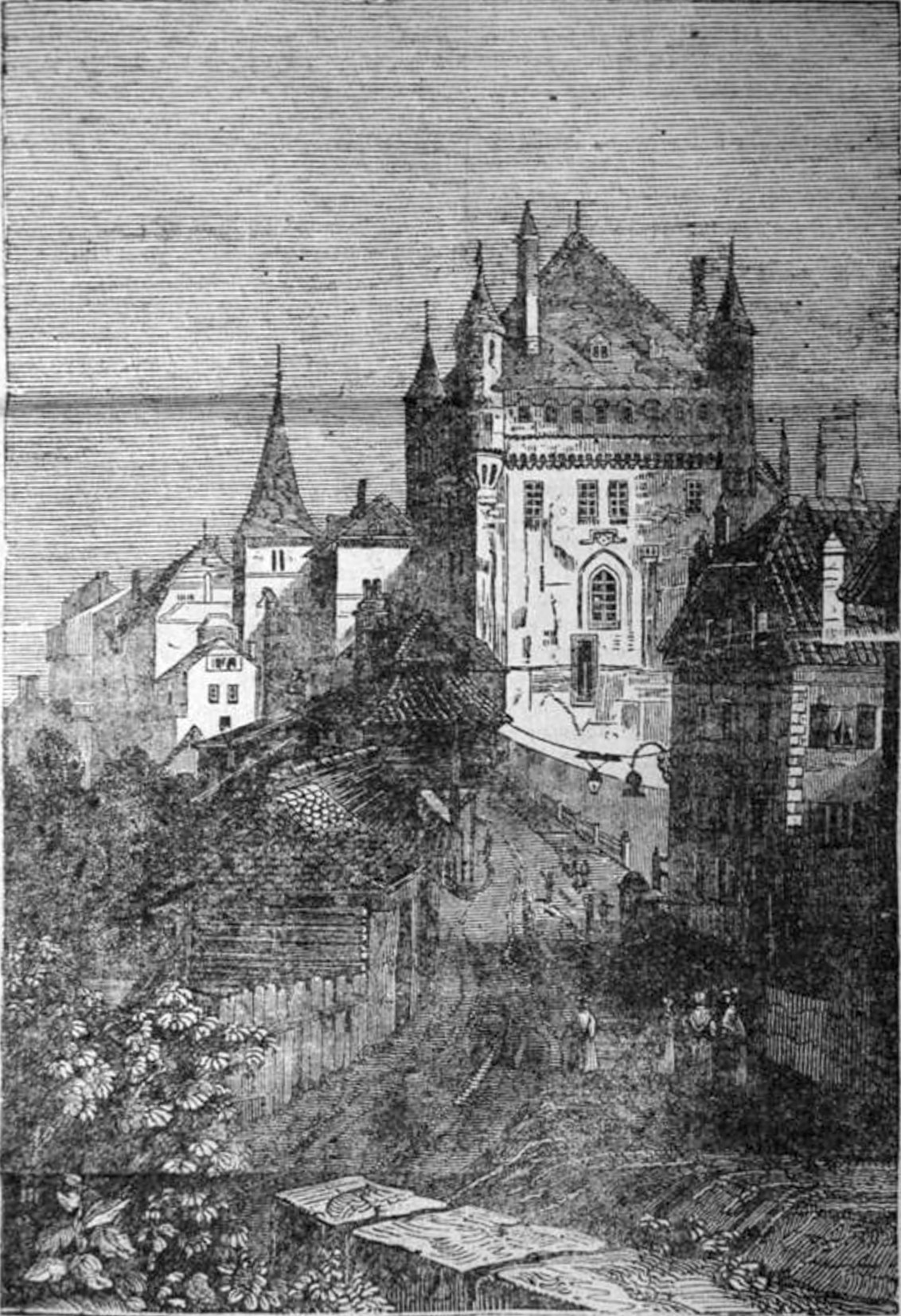 Lausana (Lausanne) woodcut print